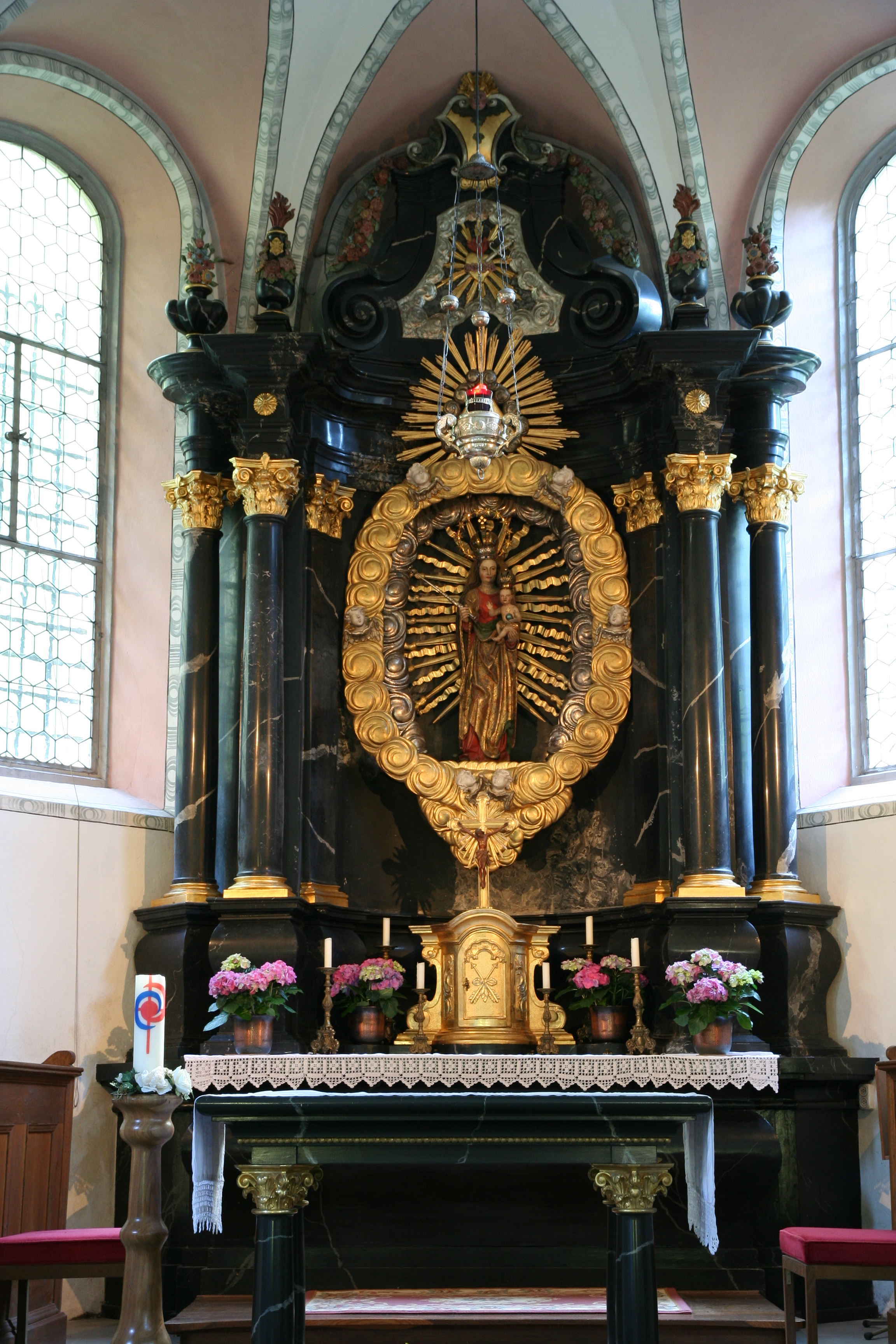 Wallfahrskapelle Jonental